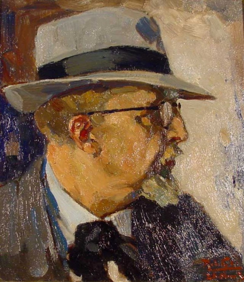 Zelfportret